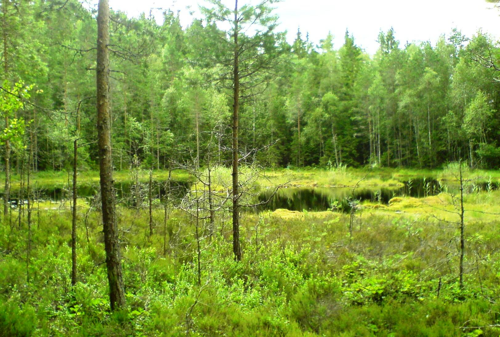 Vesle Liertjern i Aurskog-Høland kommune.